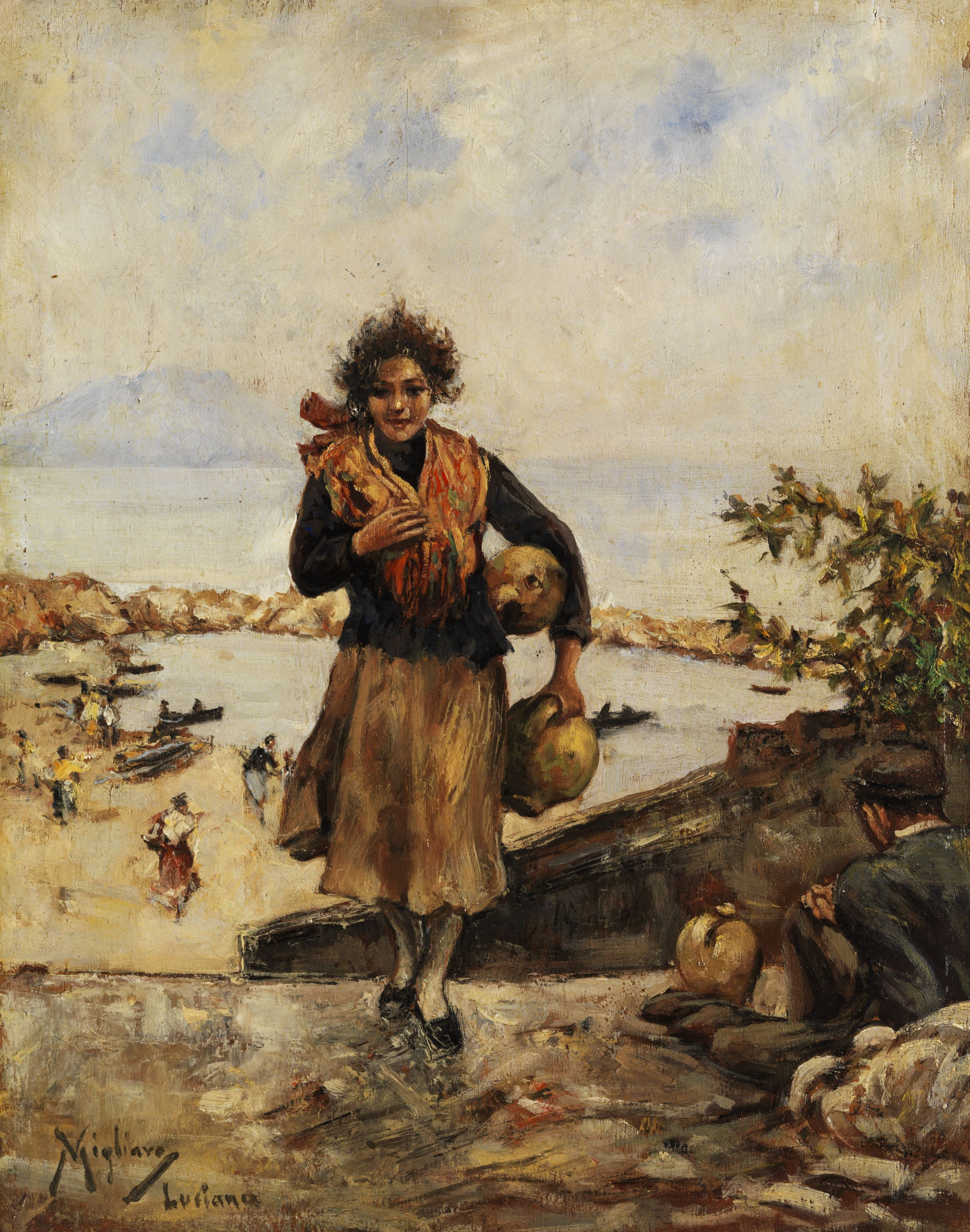 La Luciana.